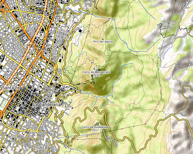 carte réalisée sur umap This map may be incomplete, and may contain errors. Don't rely solely on it for navigation.